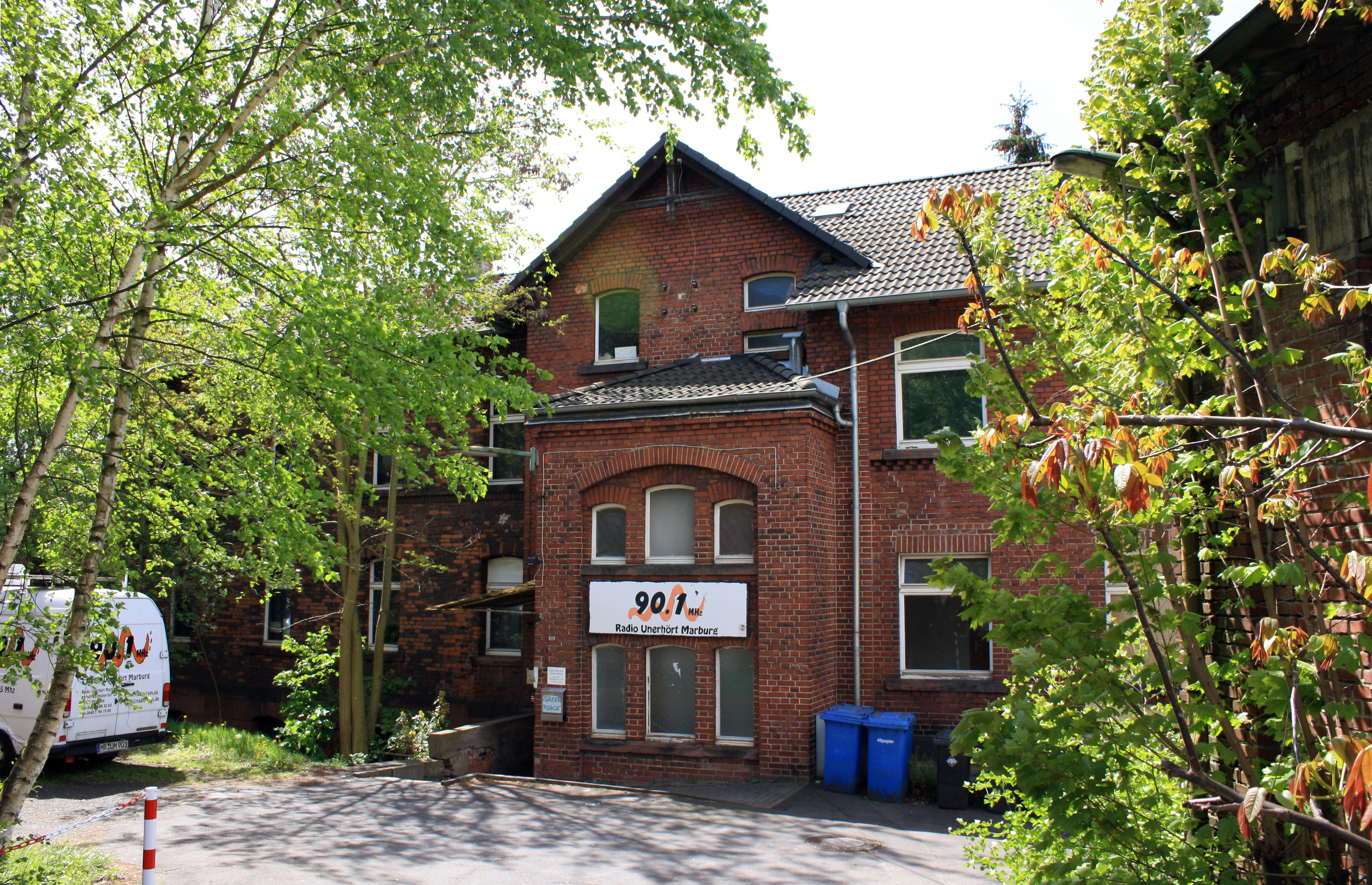 Radio Unerhört Marburg, Rudolf-Bultmann-Str. 2b, D-35039 Marburg